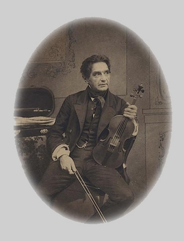 Львов, Алексей Фёдорович